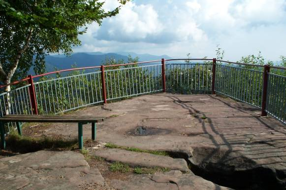 Point culminent des ruines du château de Salm